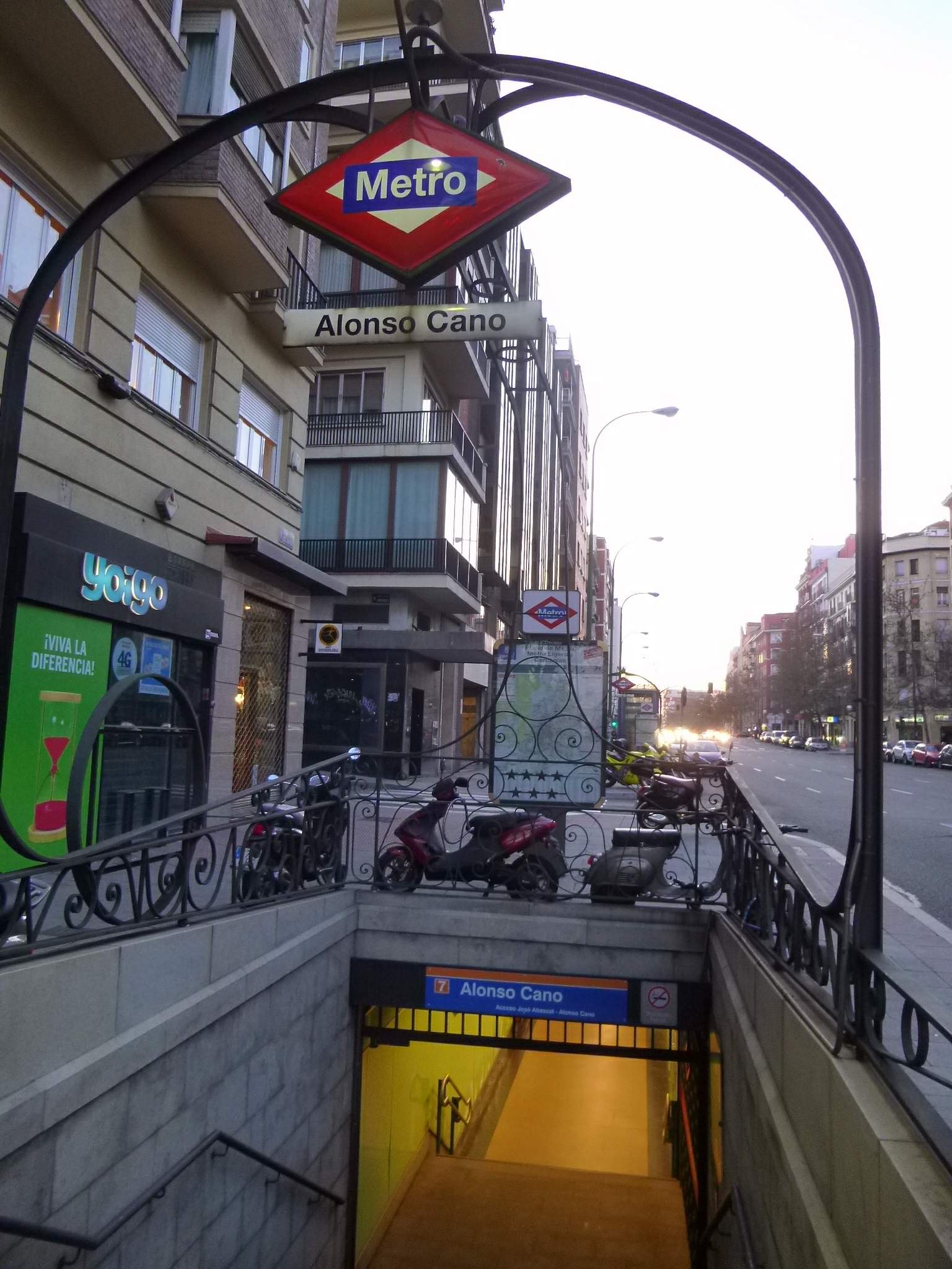 Madrid - Estación de Metro de Alonso Cano